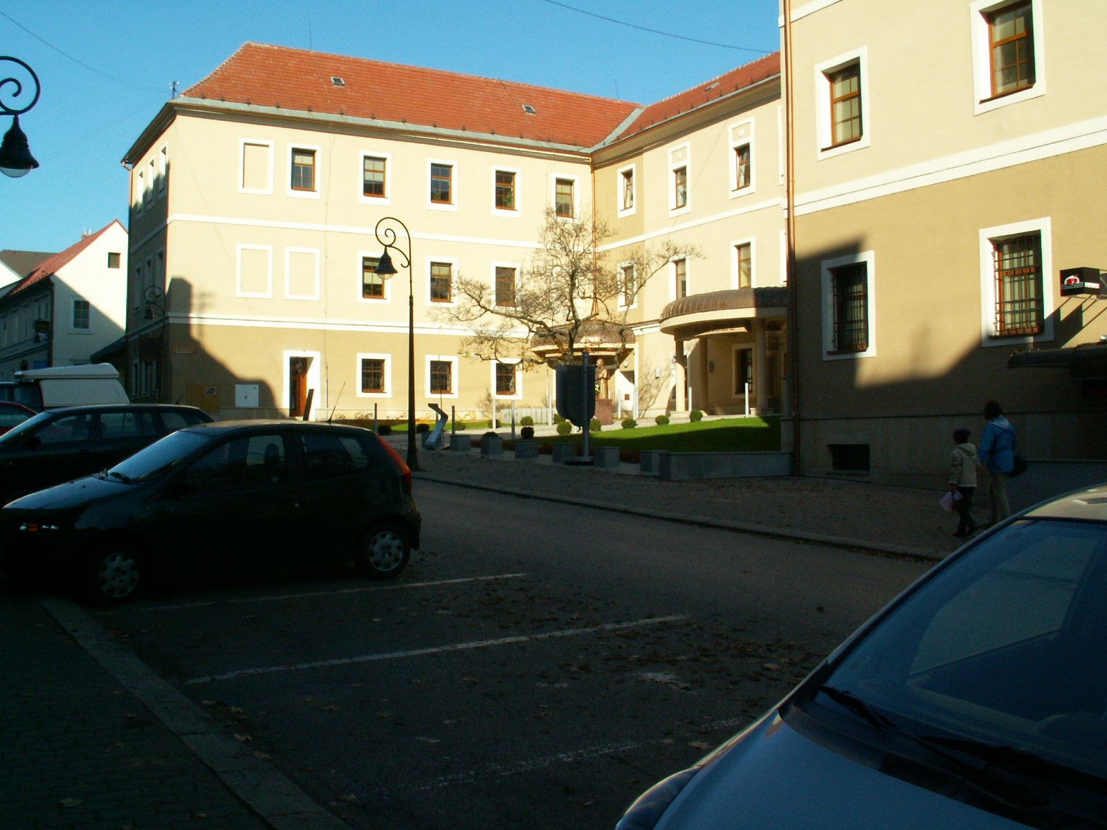 Kapitulská ulica (bývalá Základná škola)